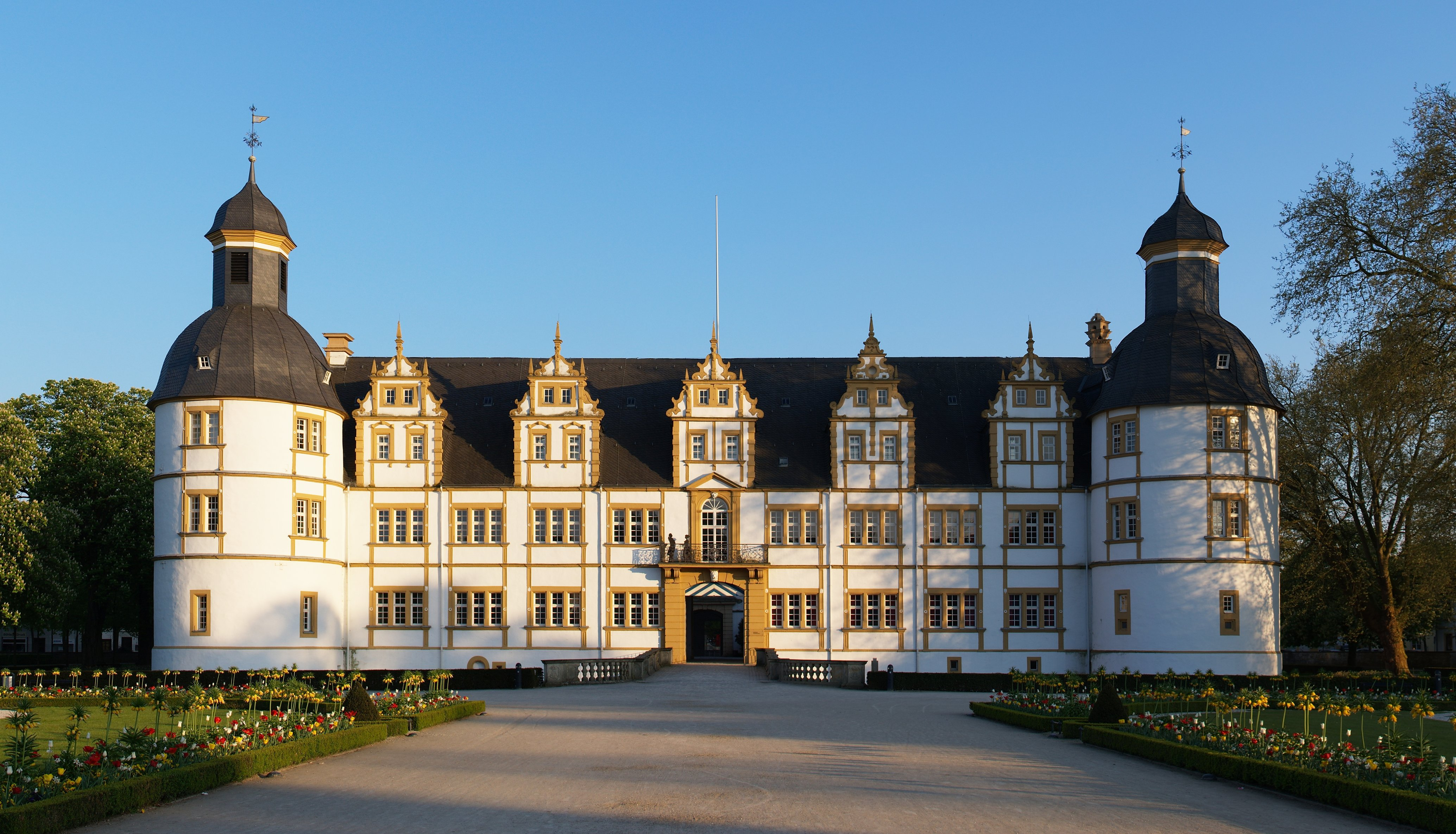 Schloß Neuhaus (Paderborn) von der Gartenfront aus gesehen